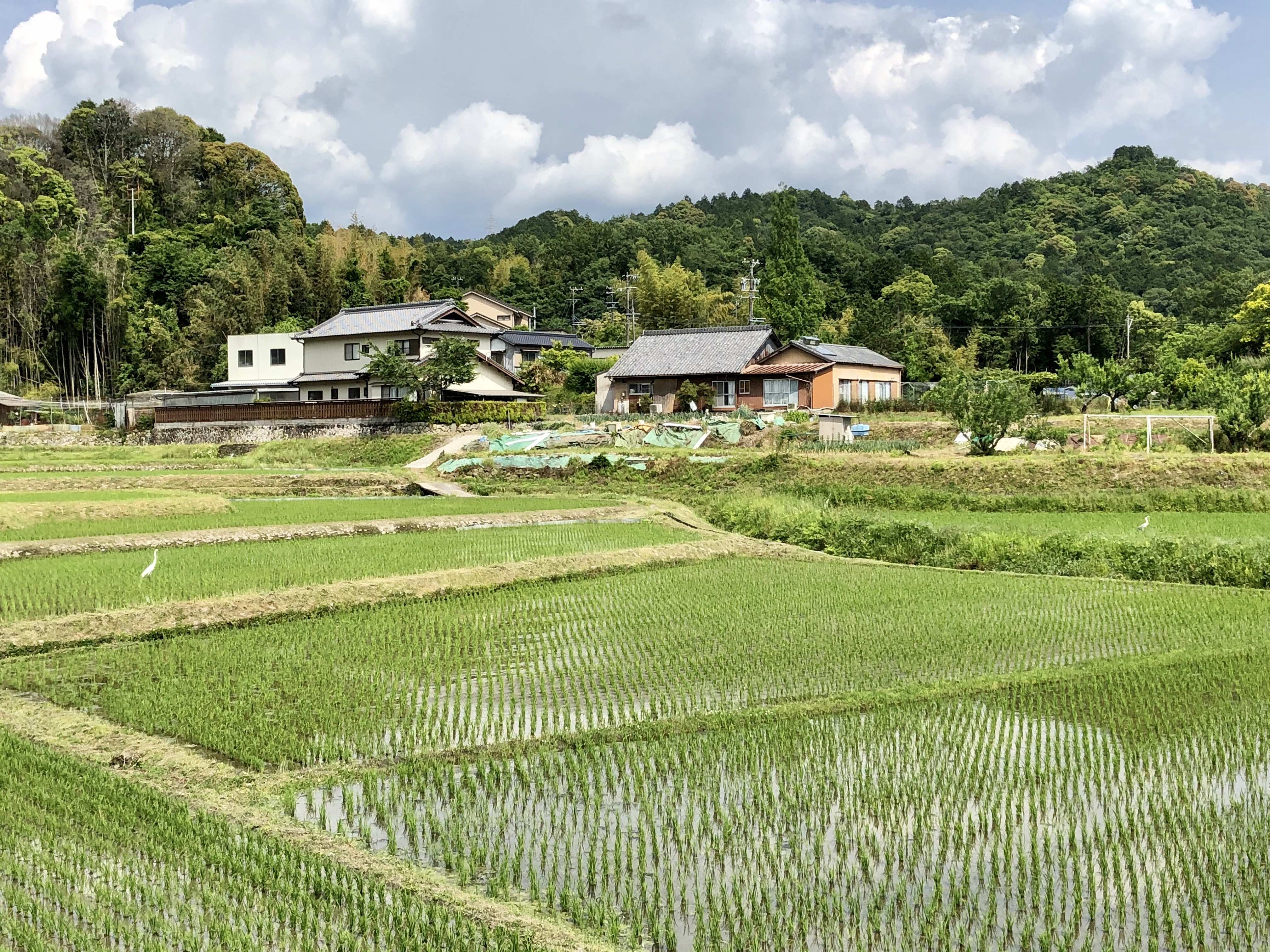 岡崎市岩中町の田園風景